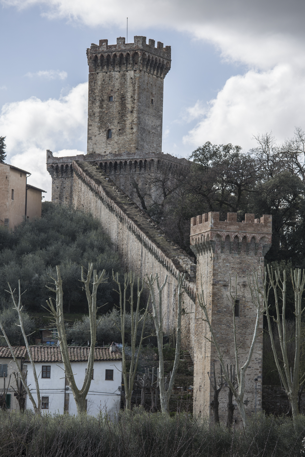 Torre del soccorso This is a photo of a monument which is part of cultural heritage of Italy.